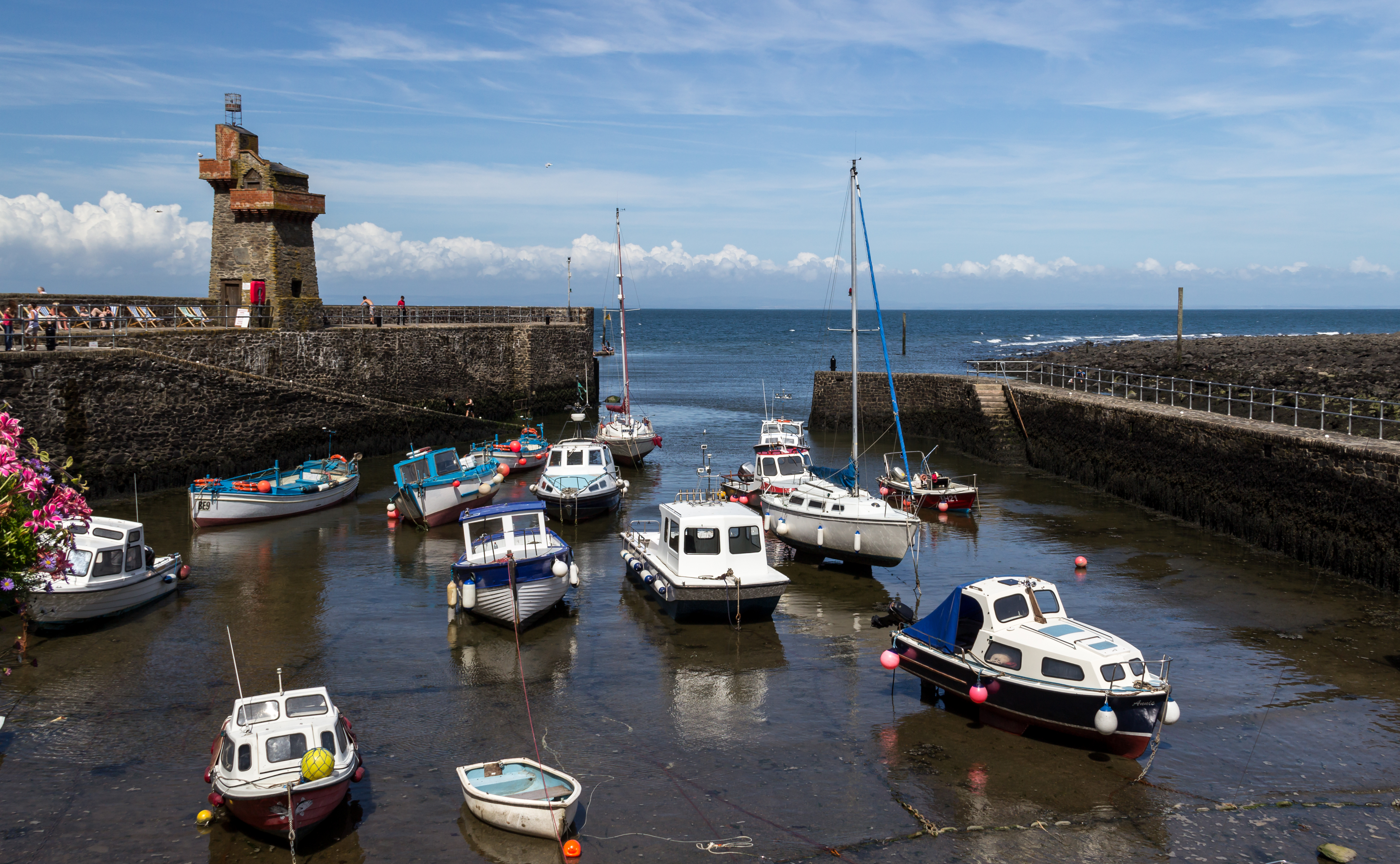 Harbour in Lynmouth, Devon, England